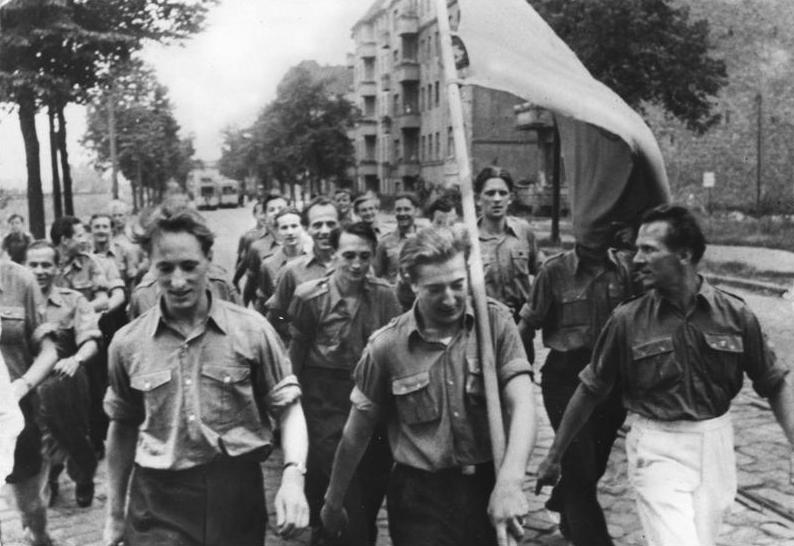 ADN-ZB/Gebhardt/ 16.3.81 Berlin 1949: Ein Demonstrationszug der FDJ marschiert durch die Damerowstraße in Pankow. An der Spitze (rechts) Erich Honecker und (links) Heinz Kessler, Mitglied des Zentralrates der FDJ.